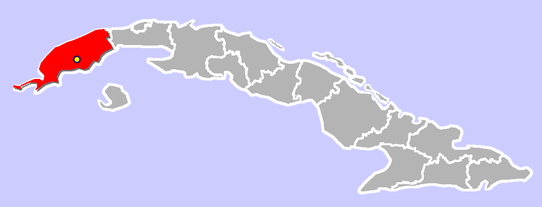 Location of Pinar_del_Río, Cuba